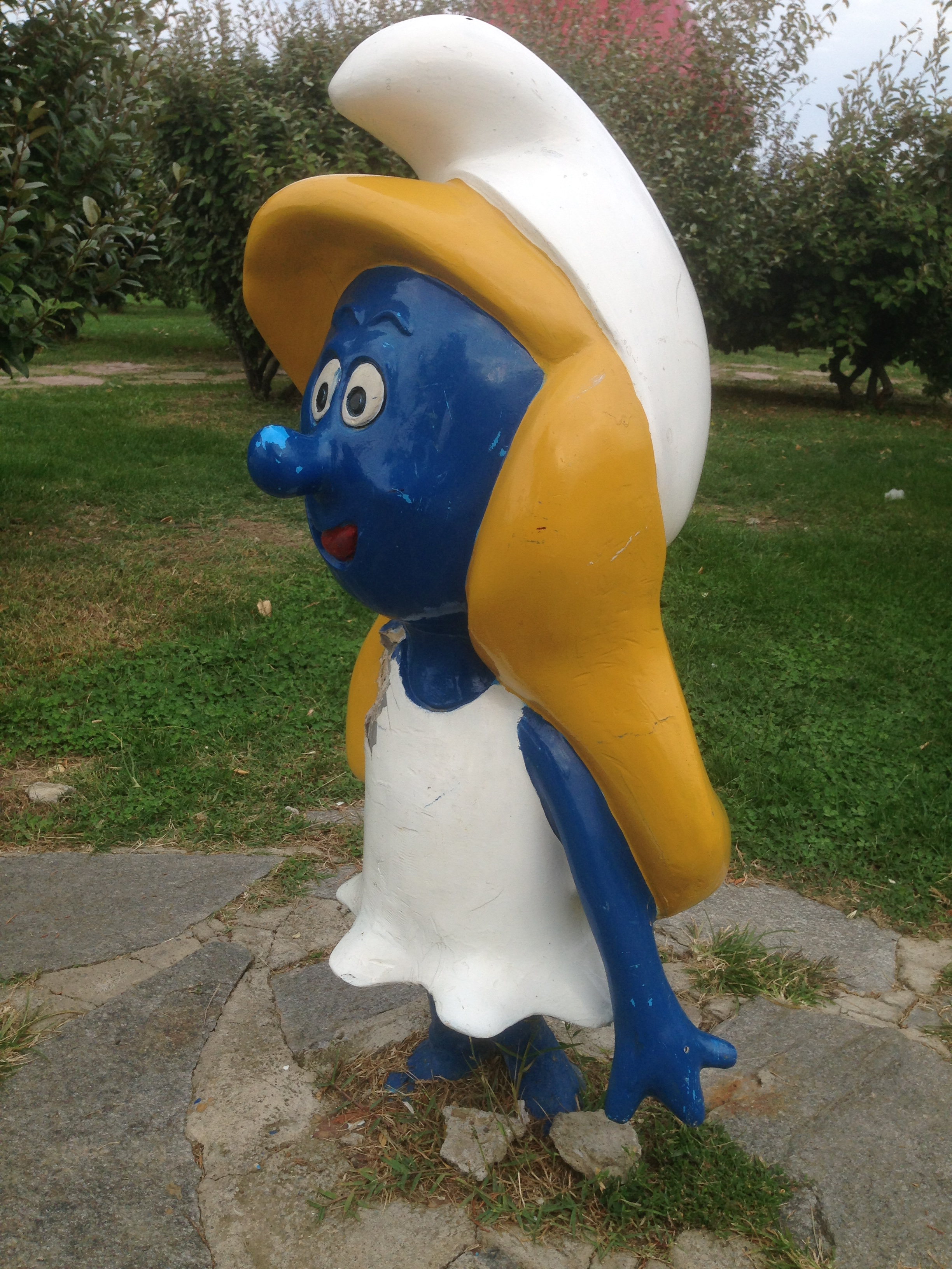 Samsun'dan çeşitli görüntüler